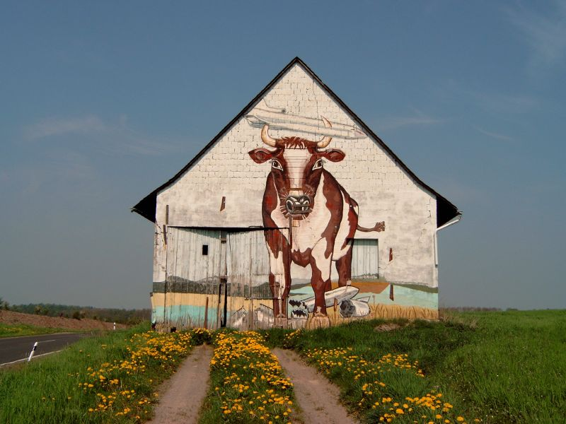 Feldscheune bei Bell. Darstellung: eine Kuh, stellvertretend für den ländlichen Hunsrück, die eine Cruise Missile auf die Hörner nimmt - eine Kunstaktion Düsseldorfer Künstler - „Wandmalgruppe". Das Bild wurde erstellt in Zusammenhang mit der Stationierung von Cruise Missiles in der Raketenstation Pydna.